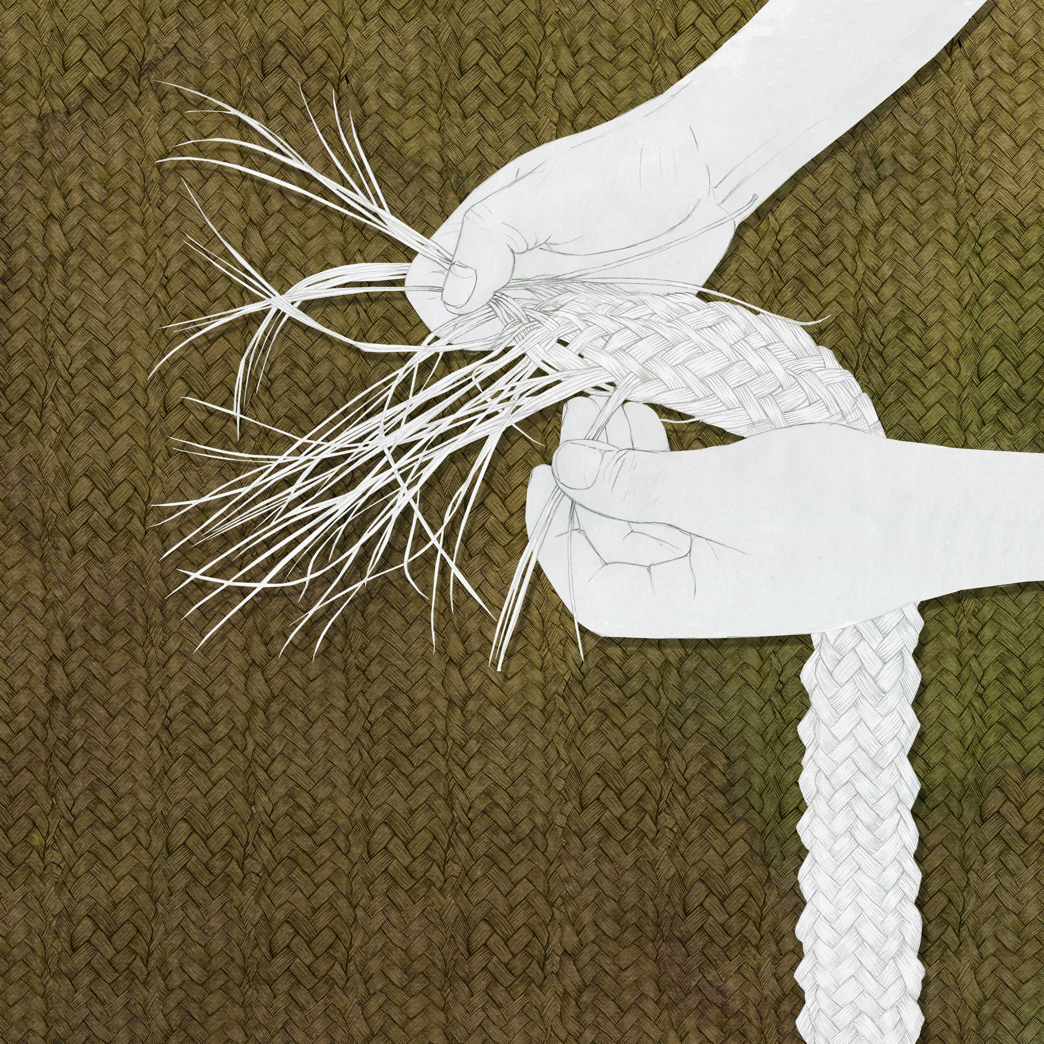 Imatge d'Andrés Marín Jarque (Museu Valencià d'Etnologia) on es trena una llata d'espart.